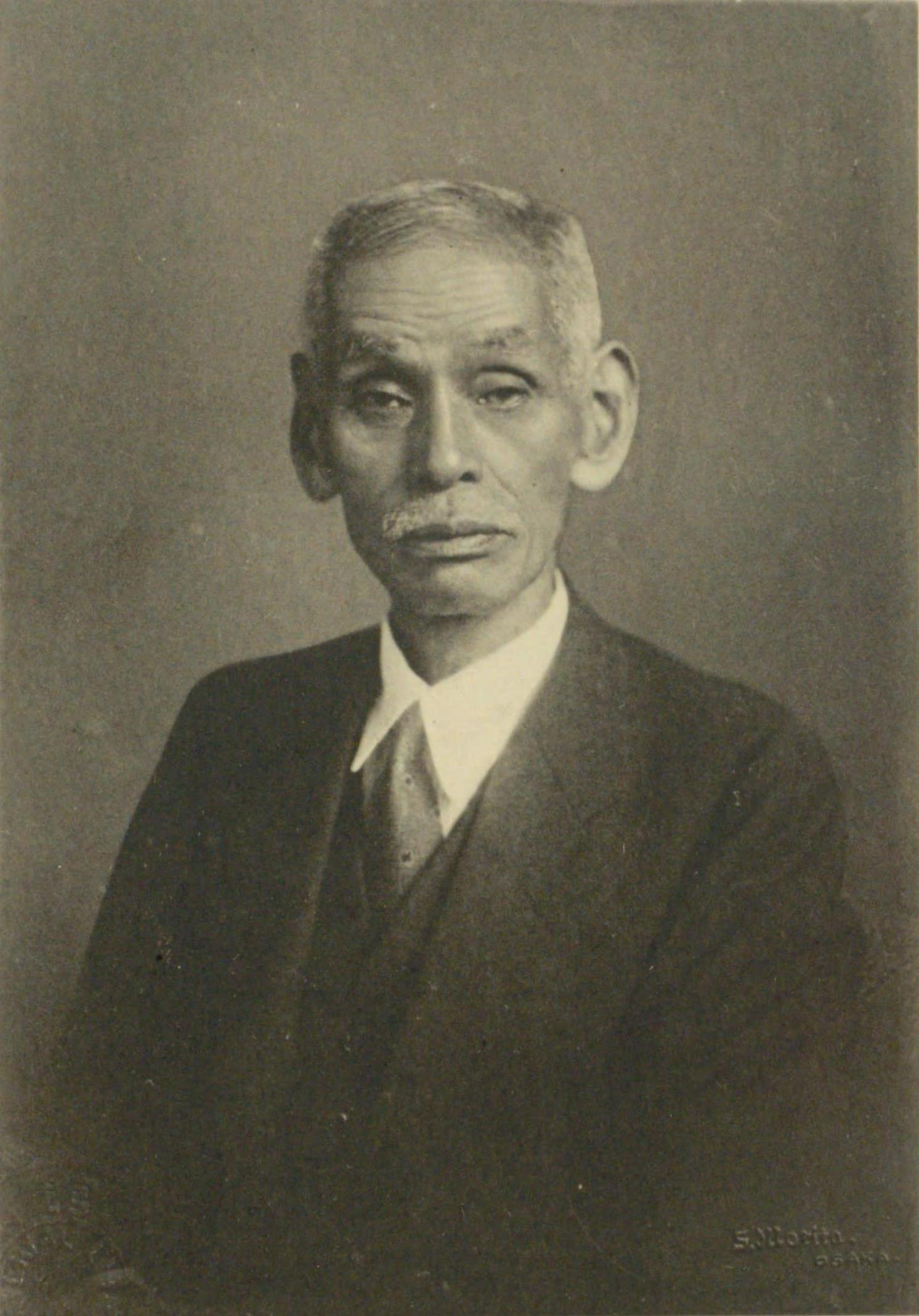 活躍時代の山中定次郎 昭和3年撮影